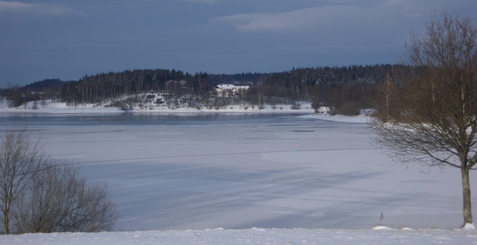 Untreusee im Süden von Hof (Saale) im Winter selbst aufgenommen im Januar 2007